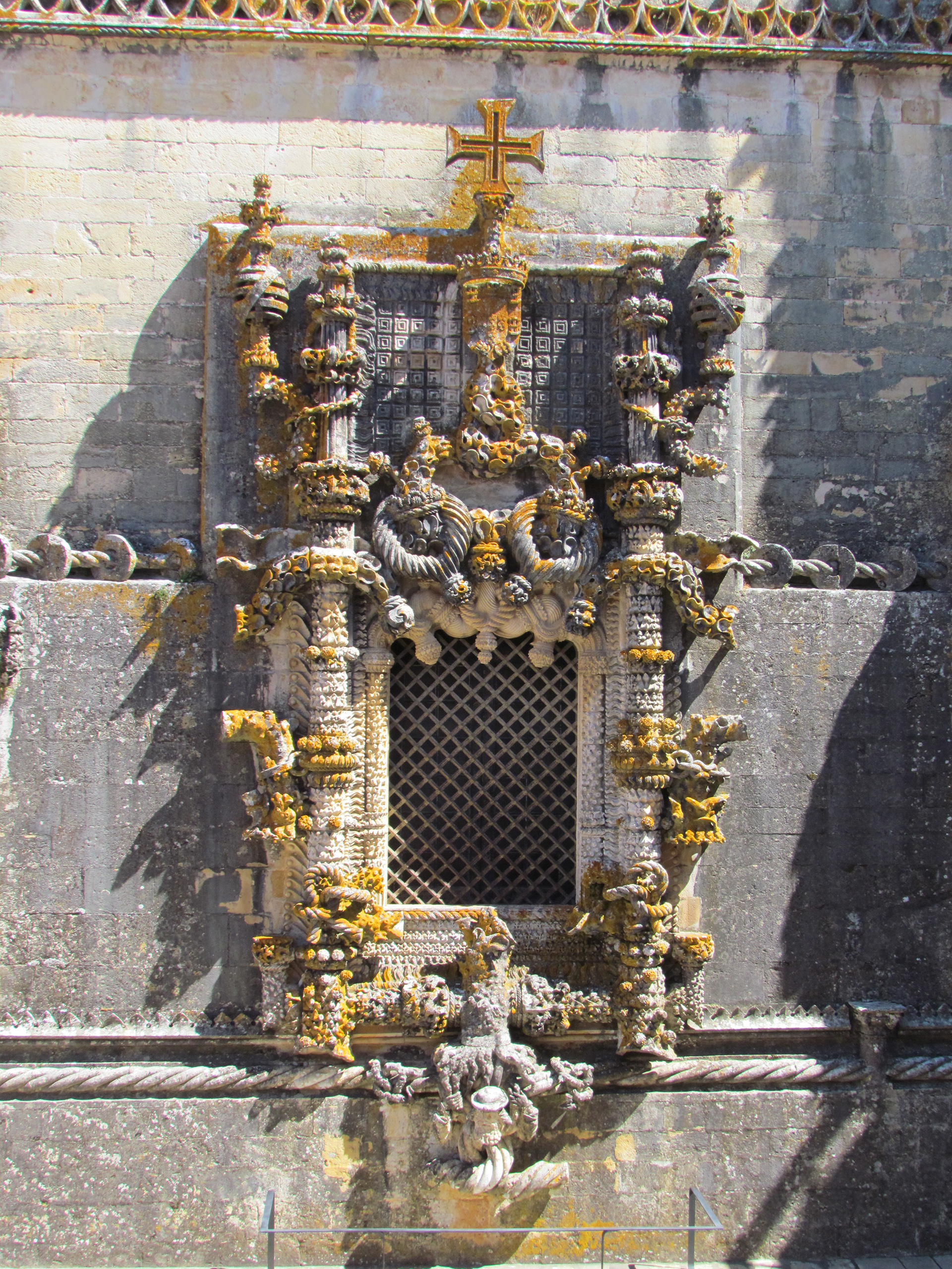 Castelo dos Templários - Tomar